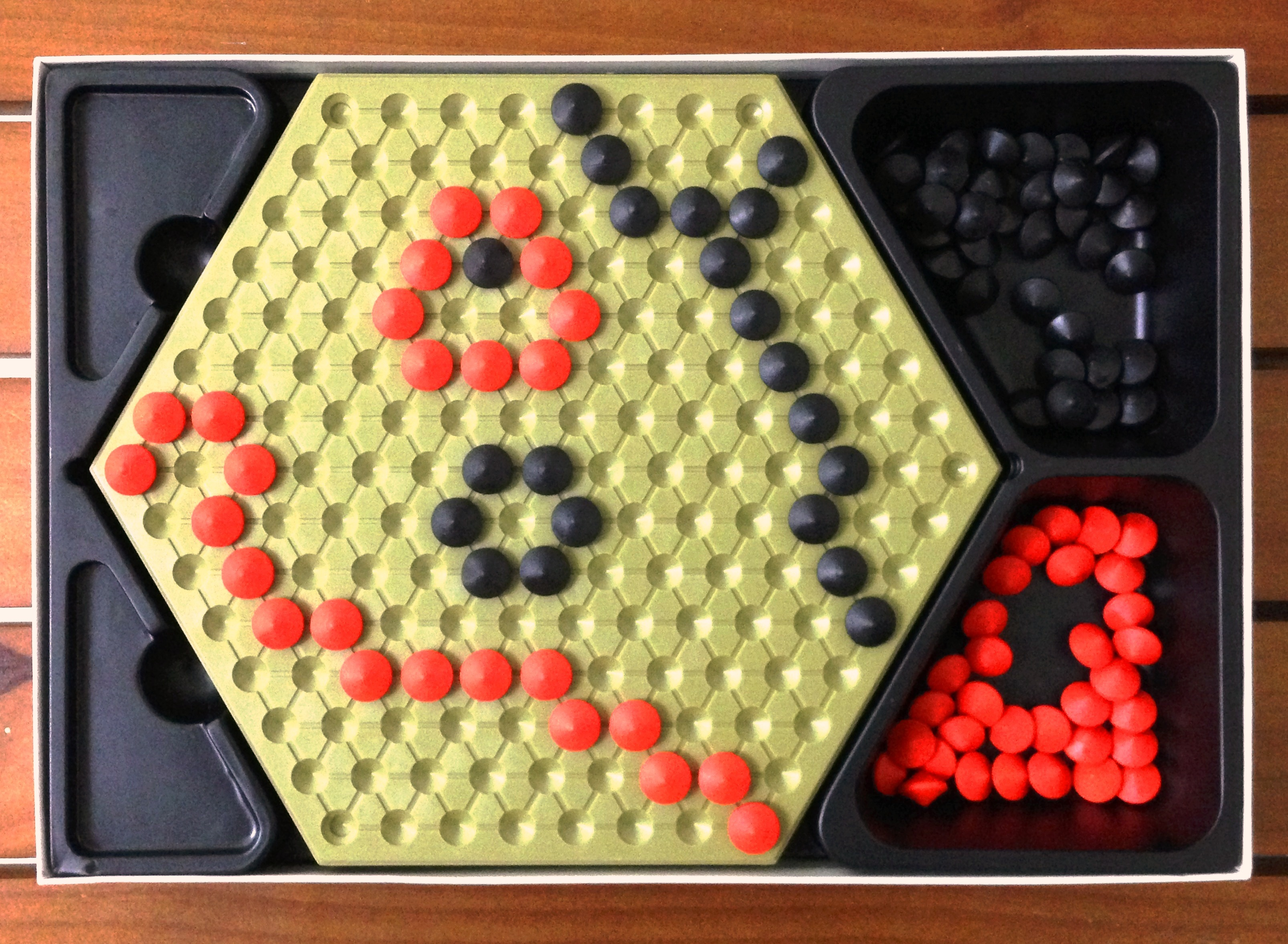 三寶棋棋具